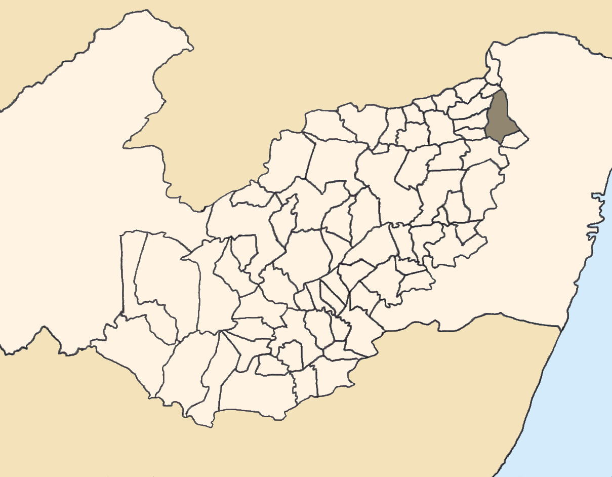 Mapa da mesorregião Agreste de Pernambuco (Brasil) subdivida em municípios. Em destaque, o município de Limoeiro. Map of the brazilian state of Pernambuco (mesorregião Agreste) showing the city of Limoeiro. Imagem tratada com o GIMP. Image made with GIMP.